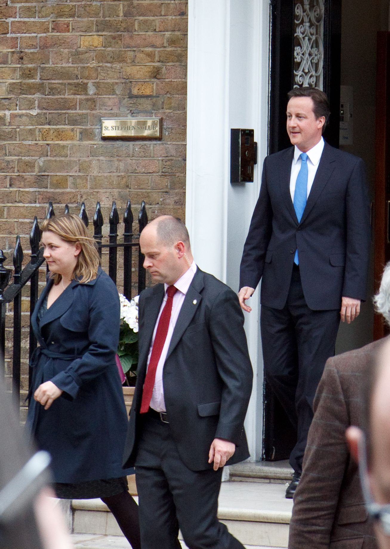 David Cameron